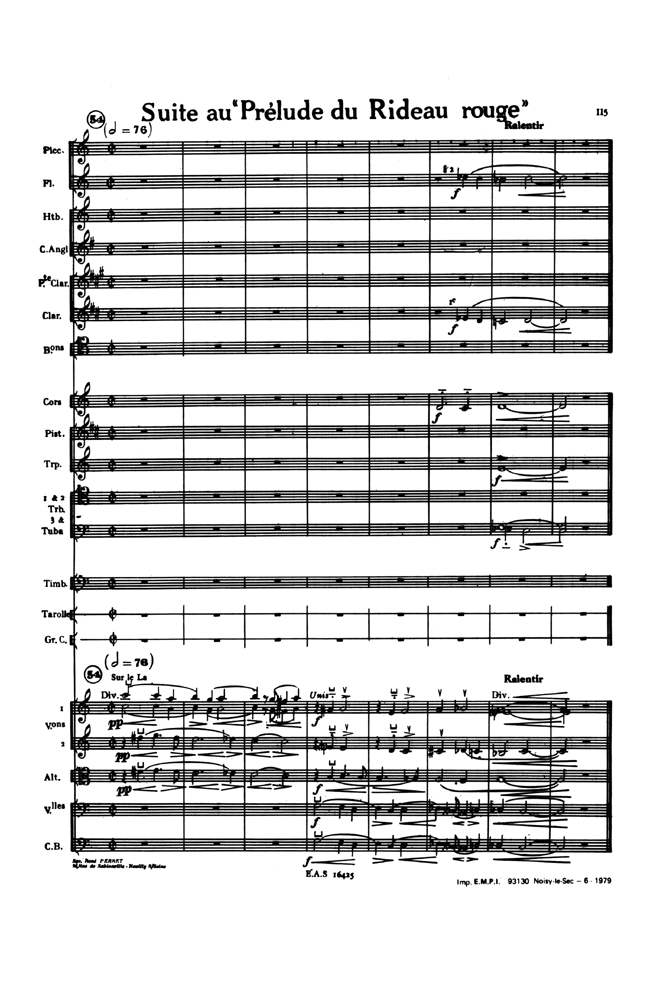 Notenblatt Suite au Prélude du Rideau rouge aus dem Ballett Parade